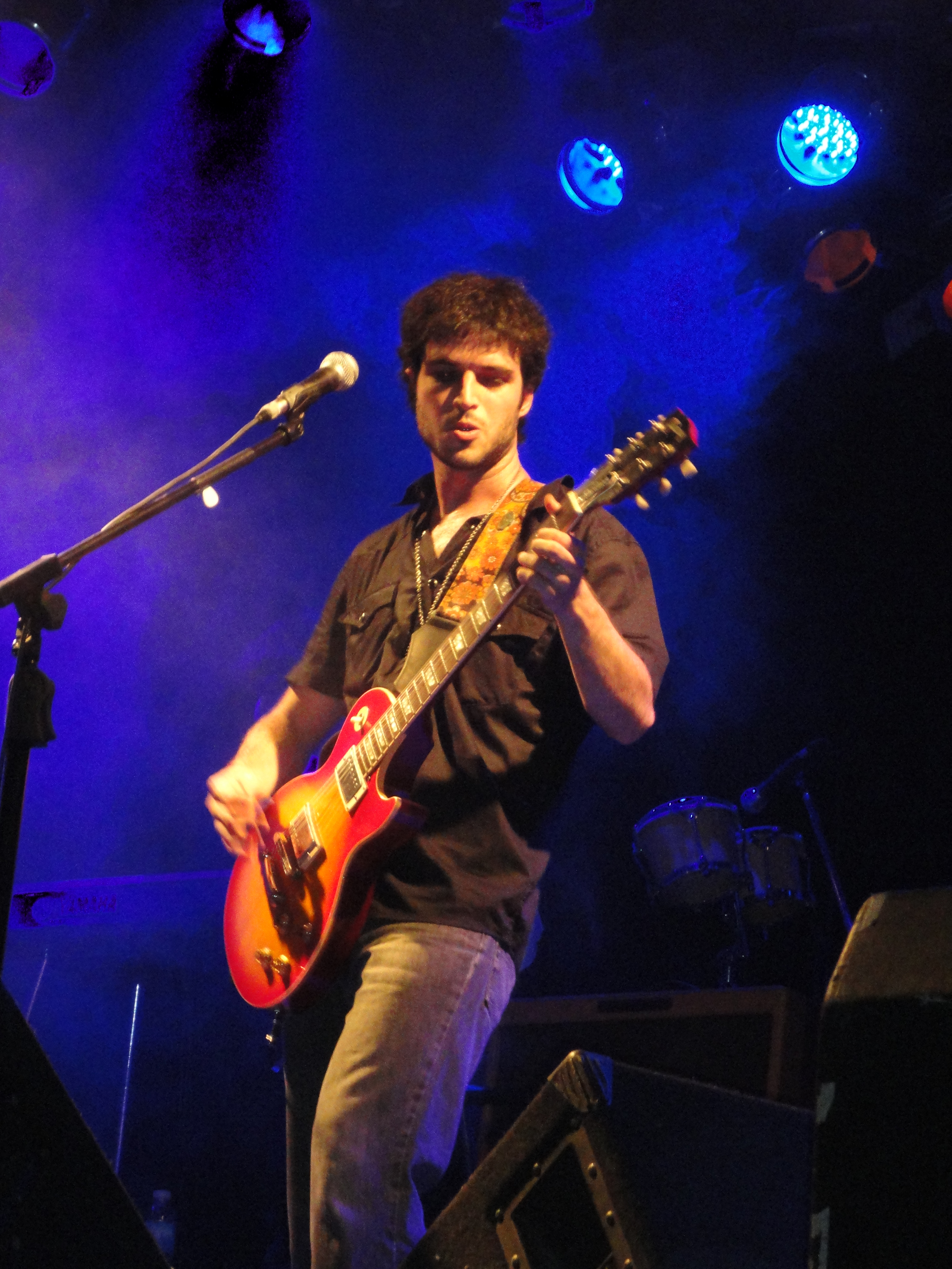 Alejandro Kurz en el recital de Rosario. 09/10/2010